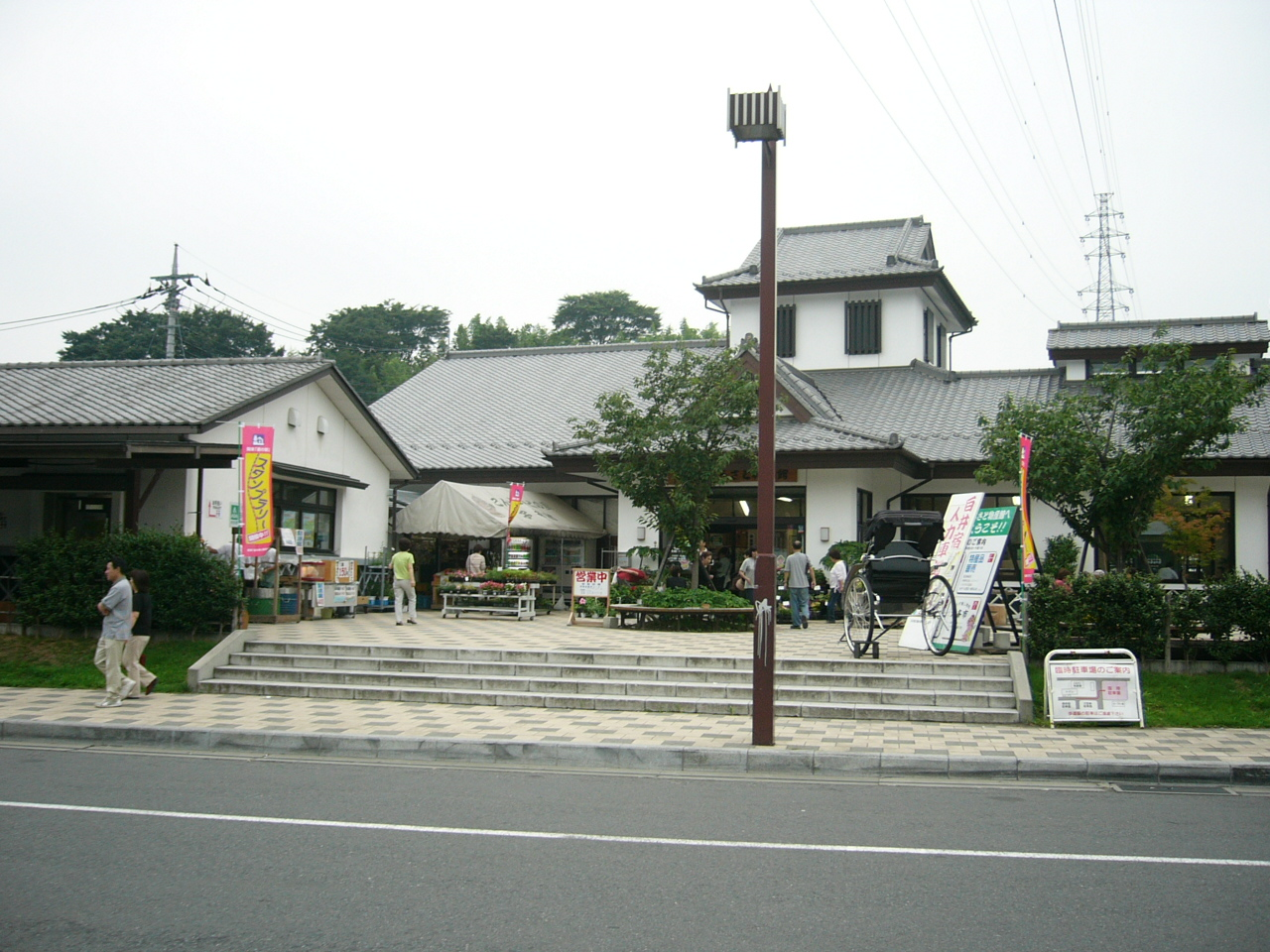 Michinoeki Komochi (Gunma) (道の駅こもち)